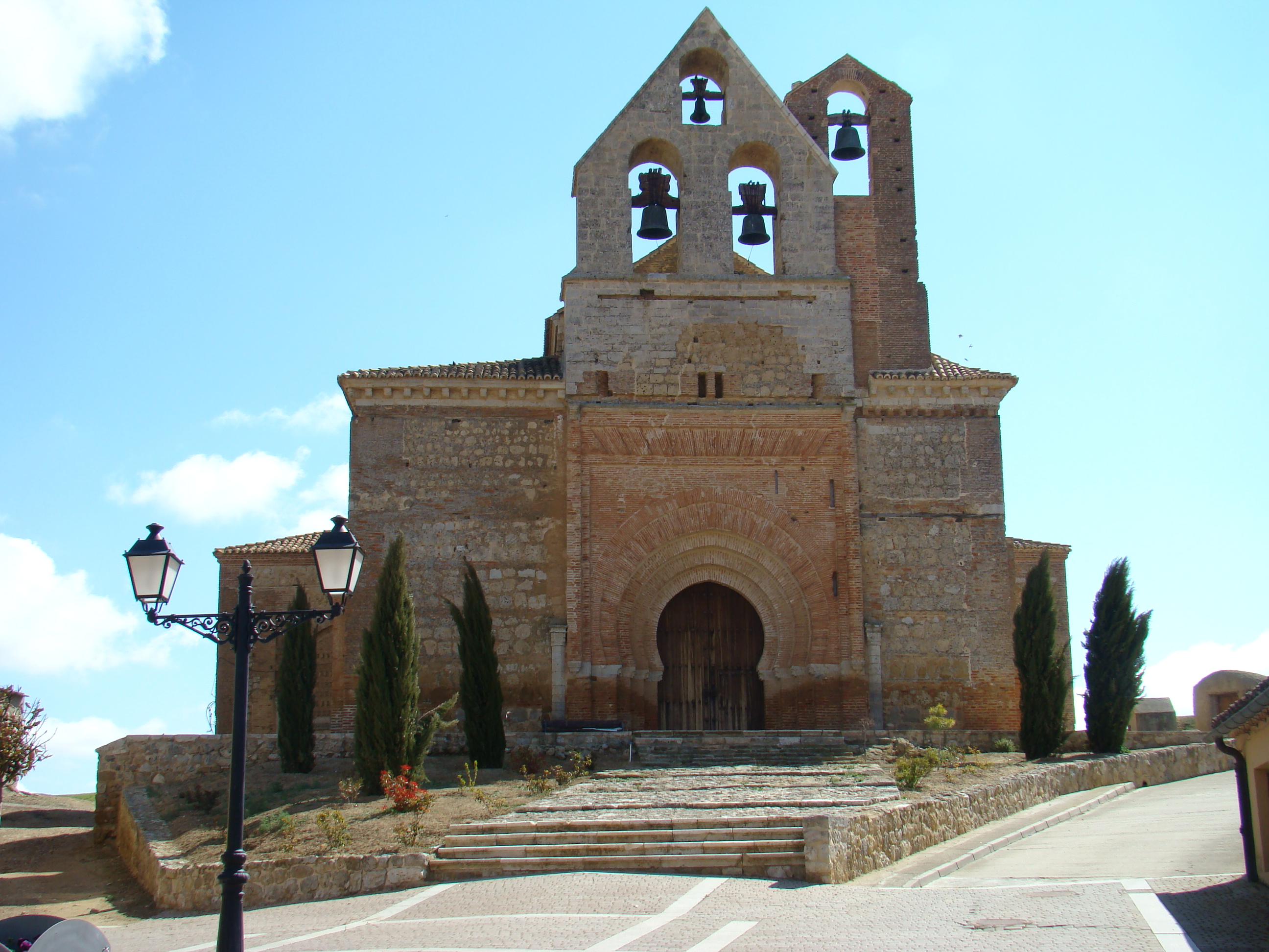 Aguilar de Campos, población española de la provincia de Valladolid. Vista la iglesia mudéjar de San Andrés.